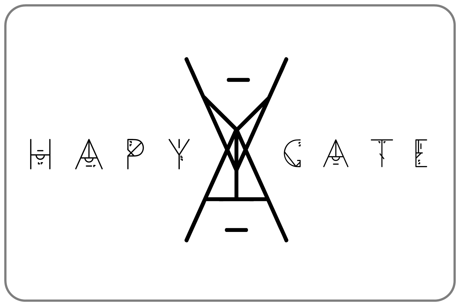 HAPYGATE LOGO